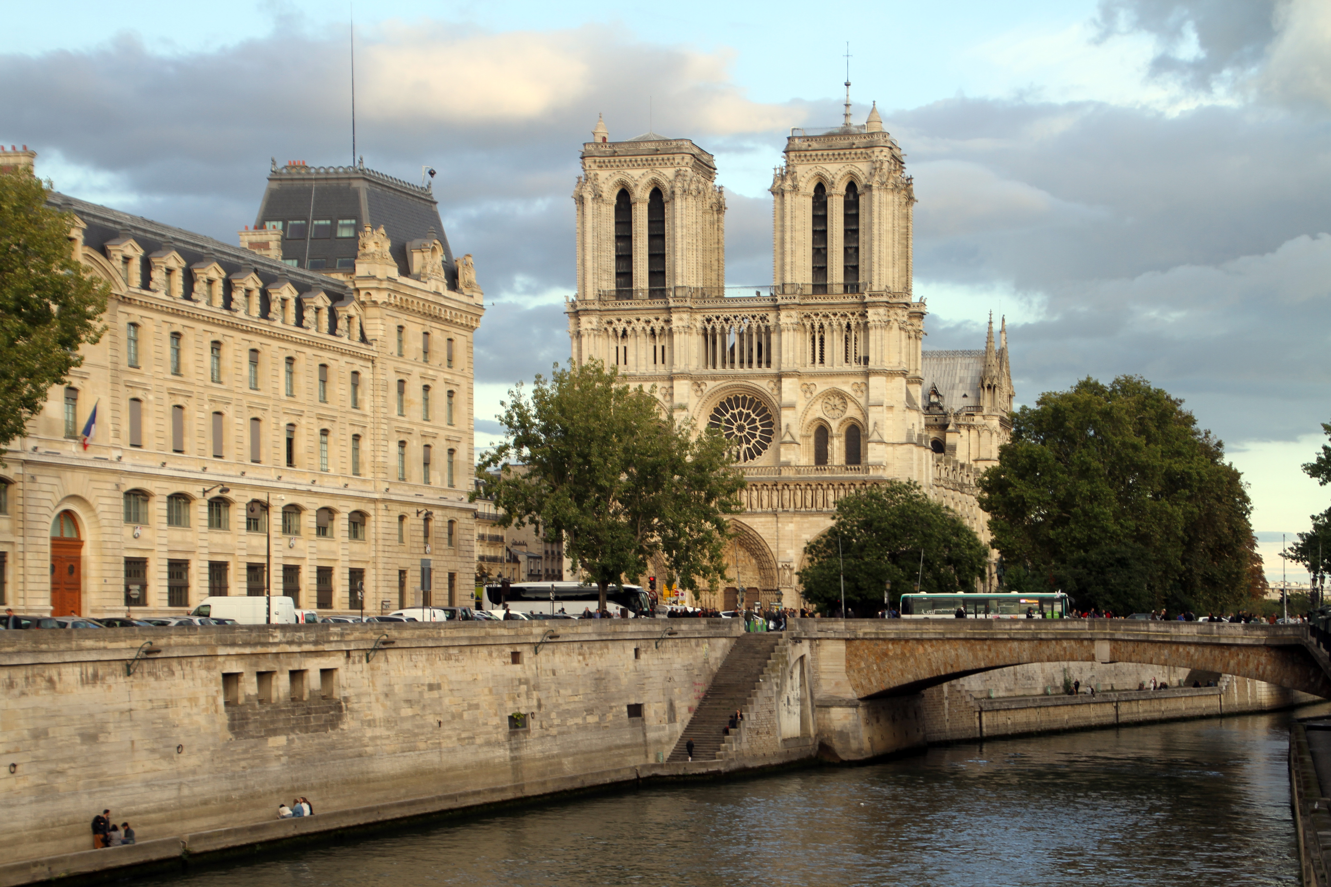 Cathédrale Notre-Dame de Paris